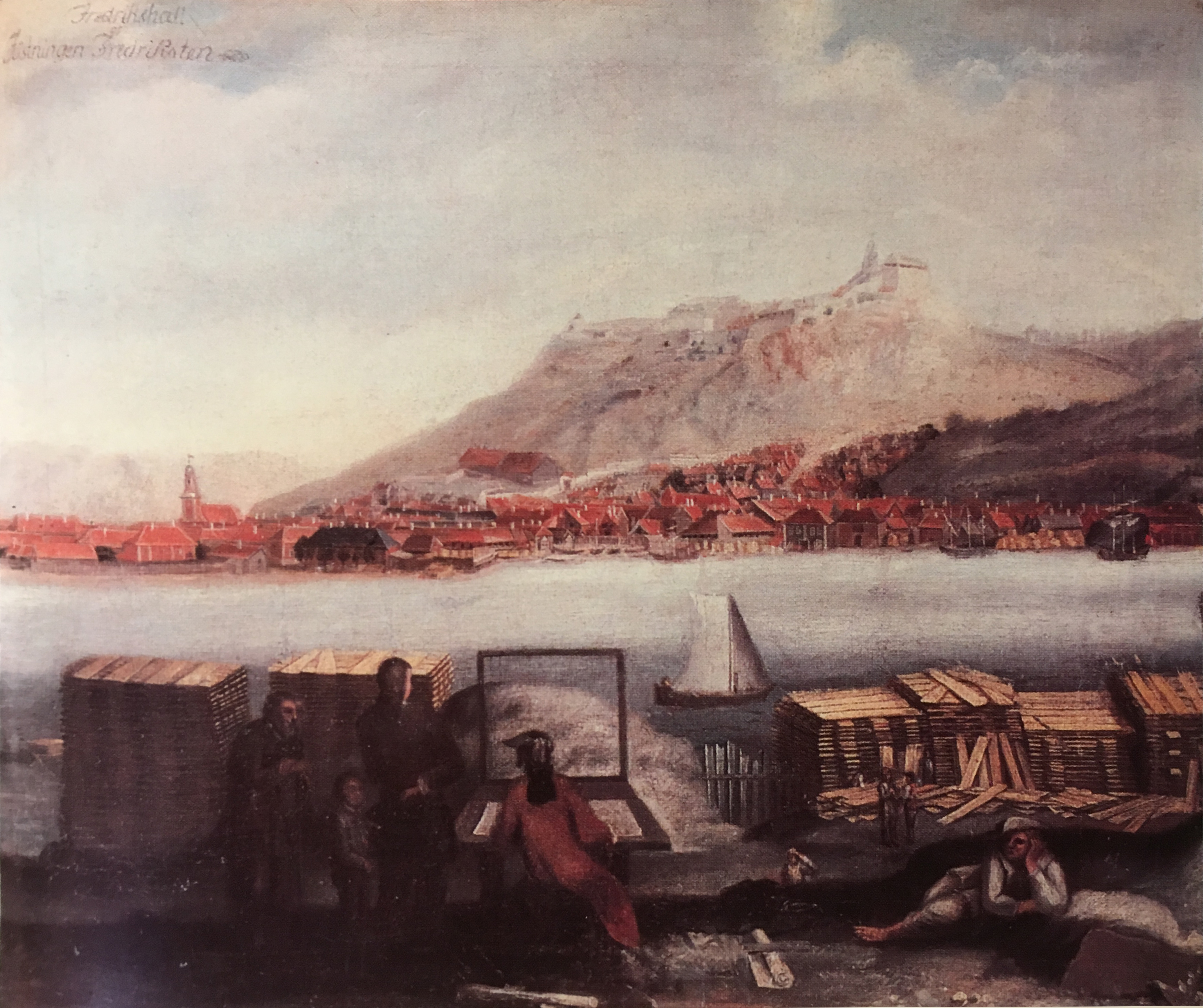 Et prospekt av den tysk-norske maleren Mathias Blumenthal. Motivet er Fredrikshald, datidens navn på Halden. I forgrunnen har maleren plassert seg selv, med ryggen til ved arbeidsbordet. Det finnes fire ulike versjoner av dette motivet.